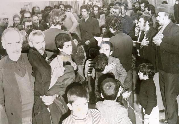 عزاداری هیئت باریکانیها روز عاشورا 1354 در تهران